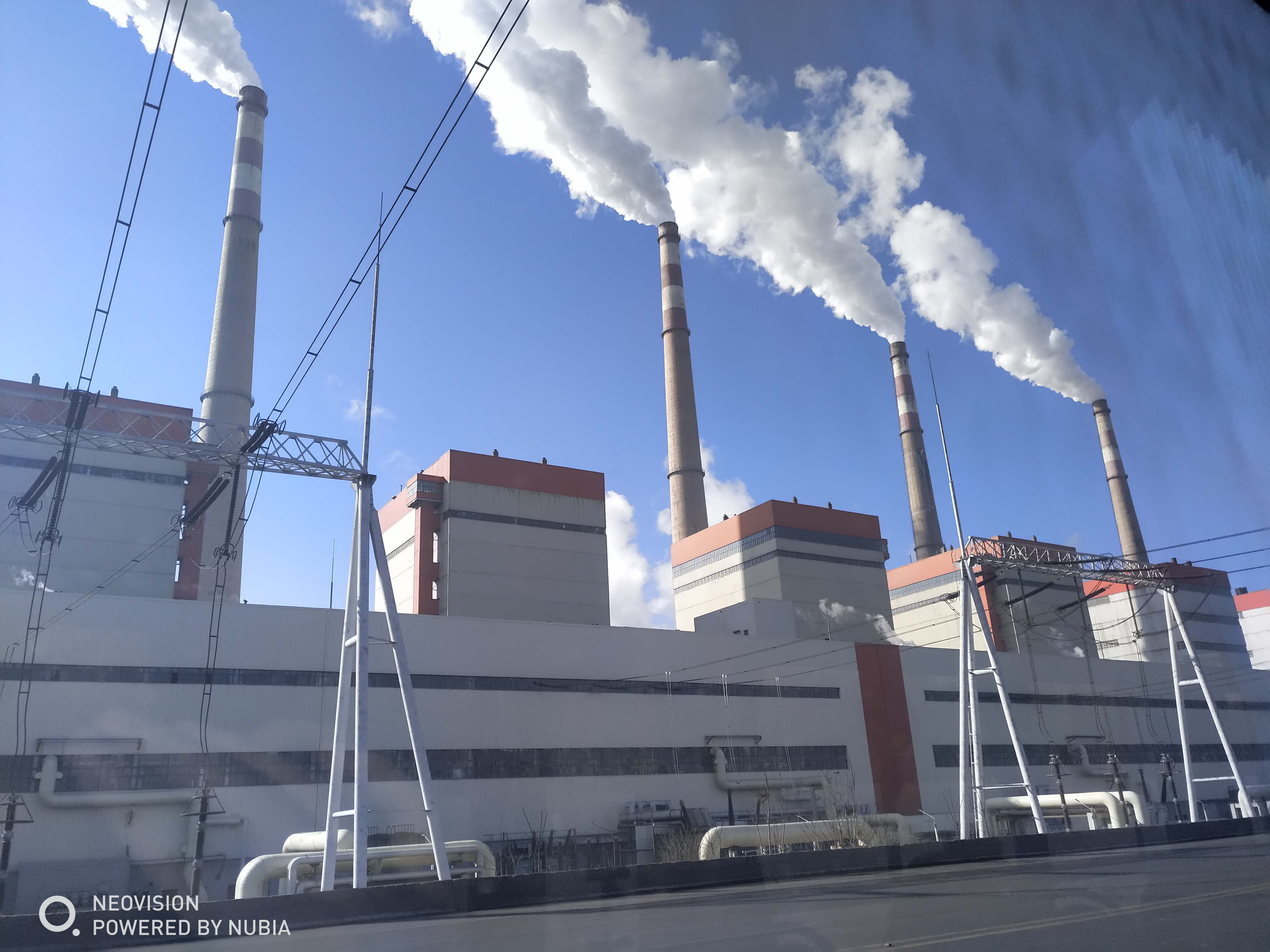 位于河北省张家口市的大唐国际张家口发电厂，拍摄于东侧